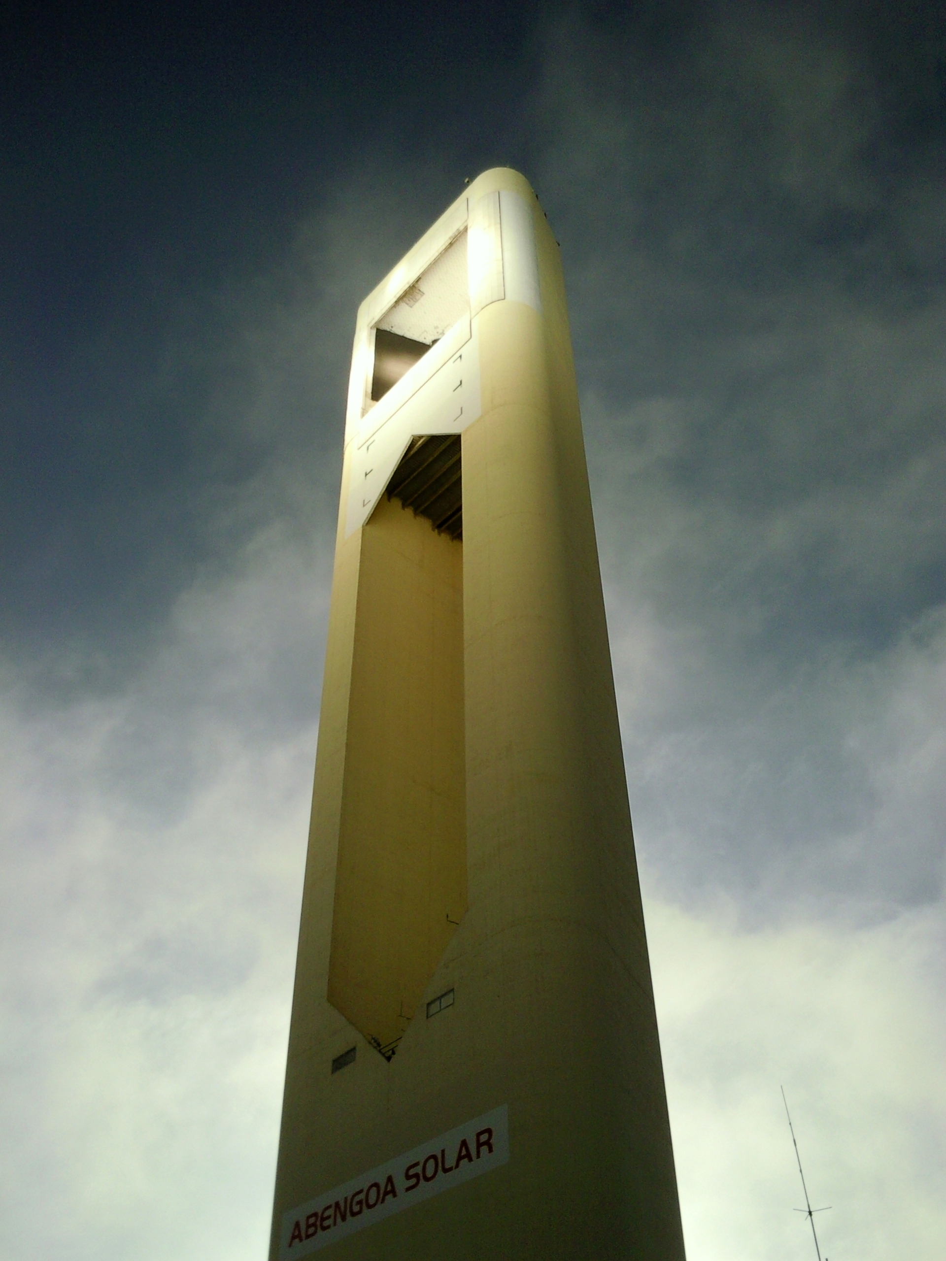 Tour solaire PS 10 à Sanlúcar la Mayor dans les environs de Séville (Espagne).